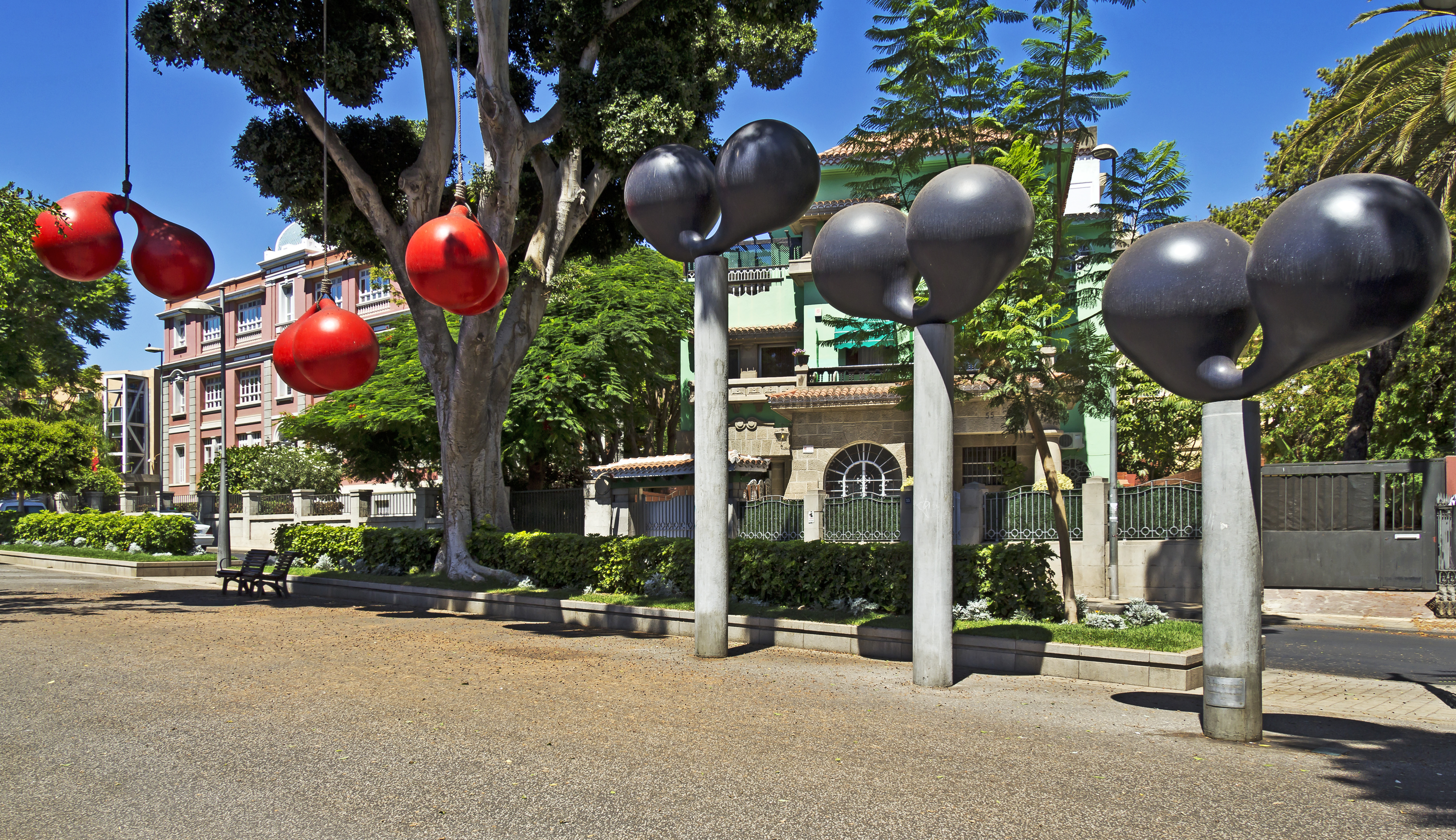 Das Ensemble „Ejecutores y ejecutados“ des Katalanischen Künstlers Xavier Corberó wurde 1973 Rahmen der „Exposición Internacional de Escultura en la Calle“ der Architektenkammer der Kanarischen auf der Rambla de Santa Cruz in Santa Cruz de Tenerife installiert.